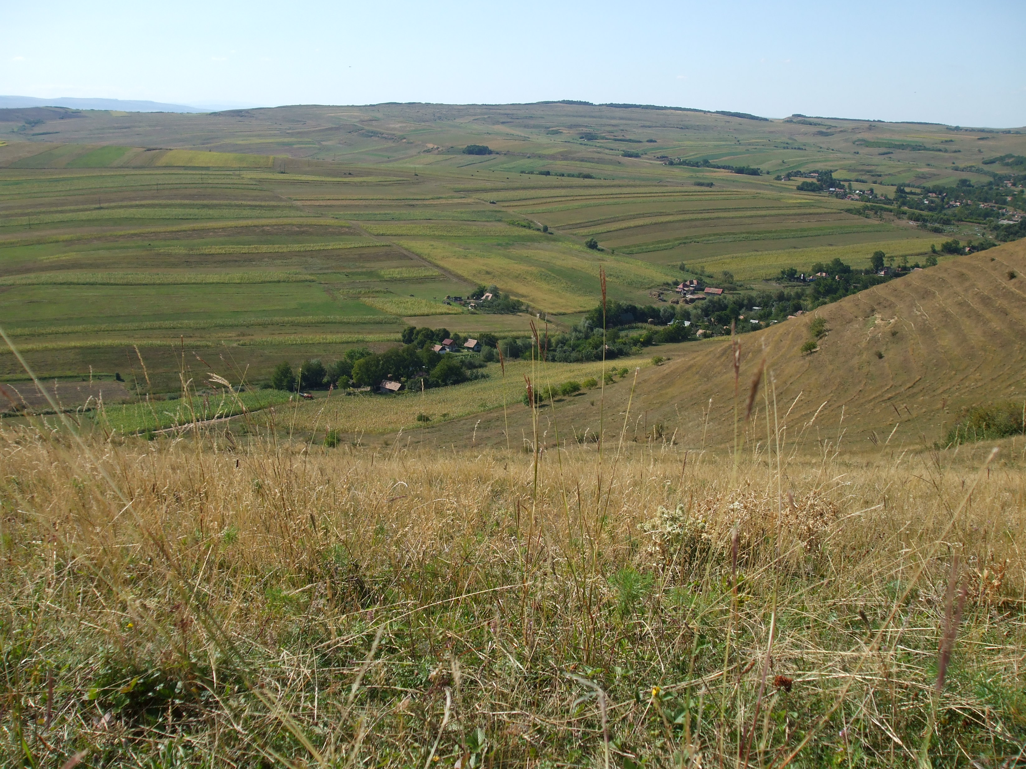 imagini din Aruncuta ,Cluj.